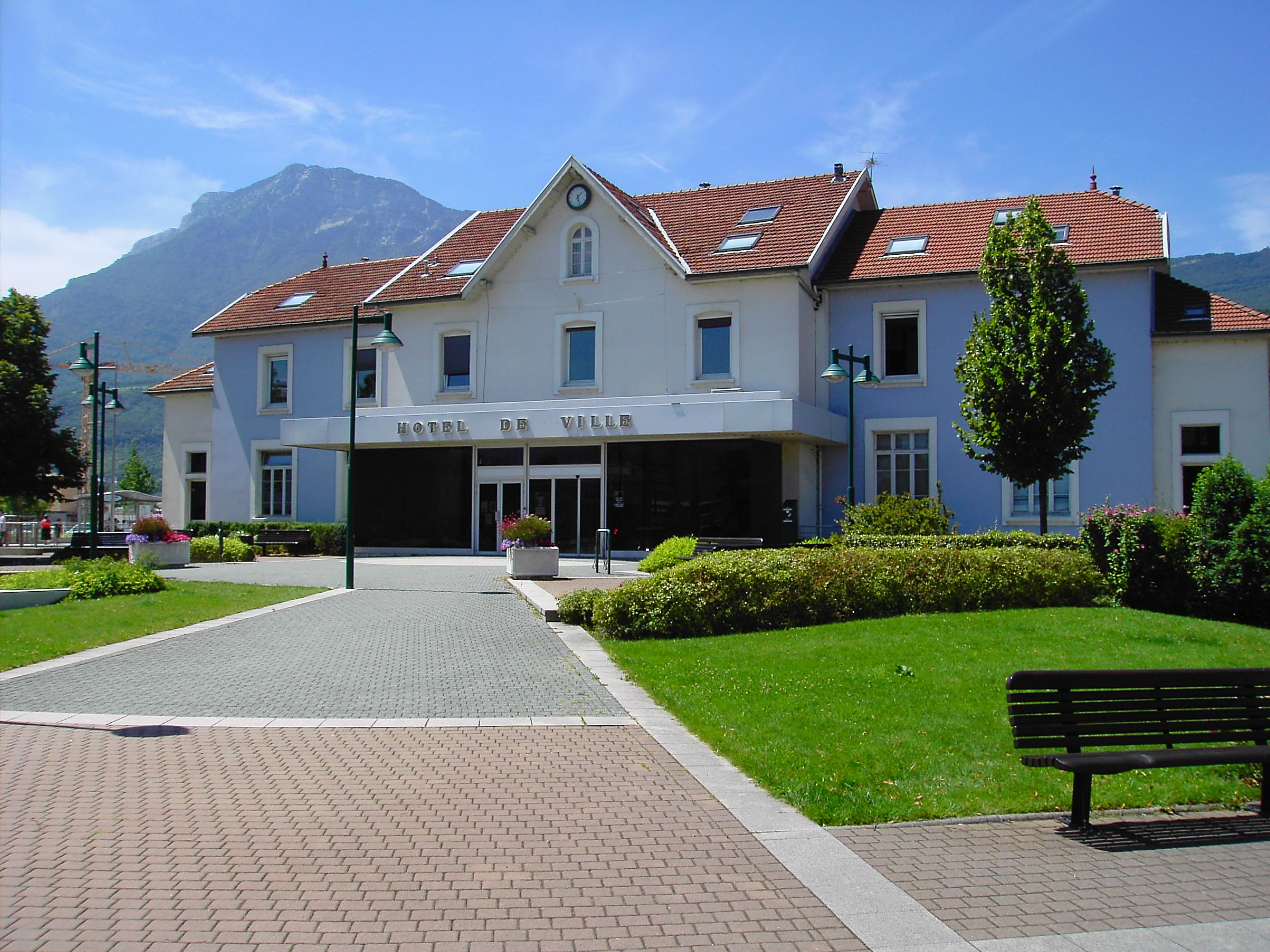 Hôtel de ville , Seyssinet-Pariset (isère)